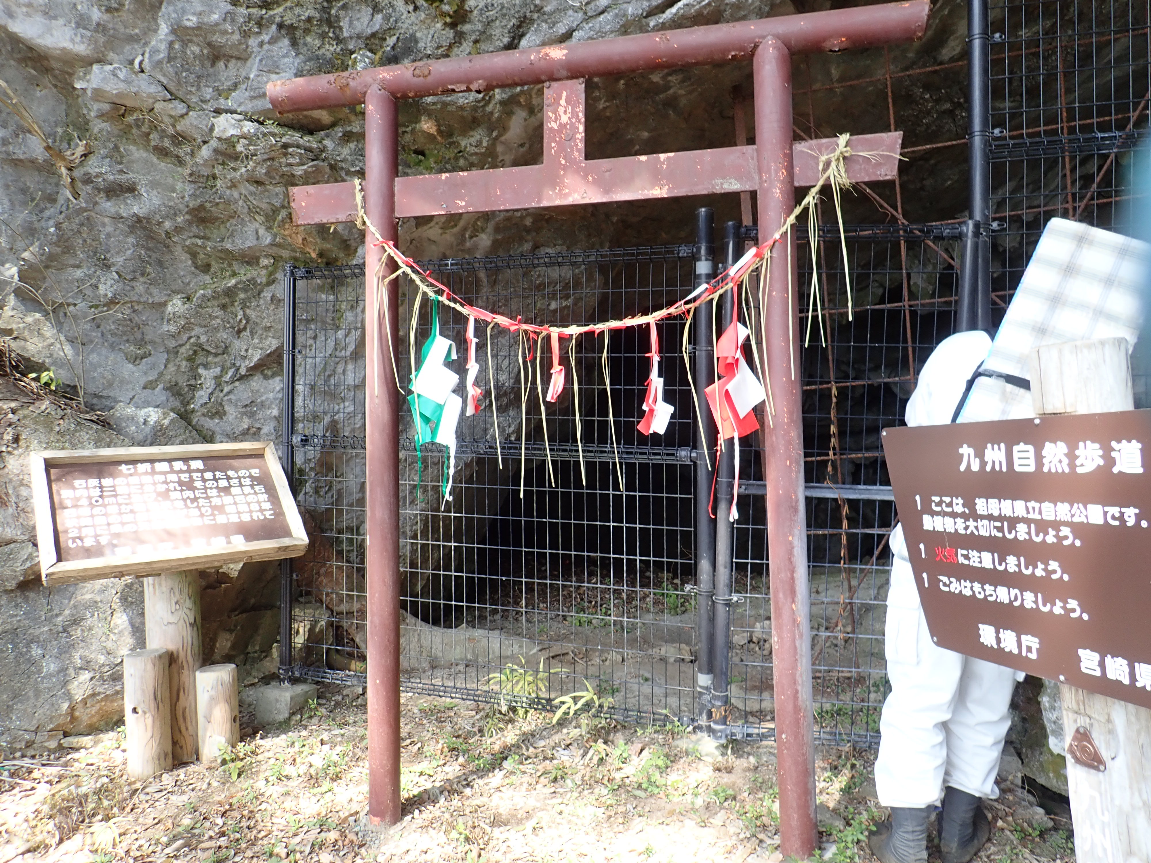 七折鍾乳洞洞口